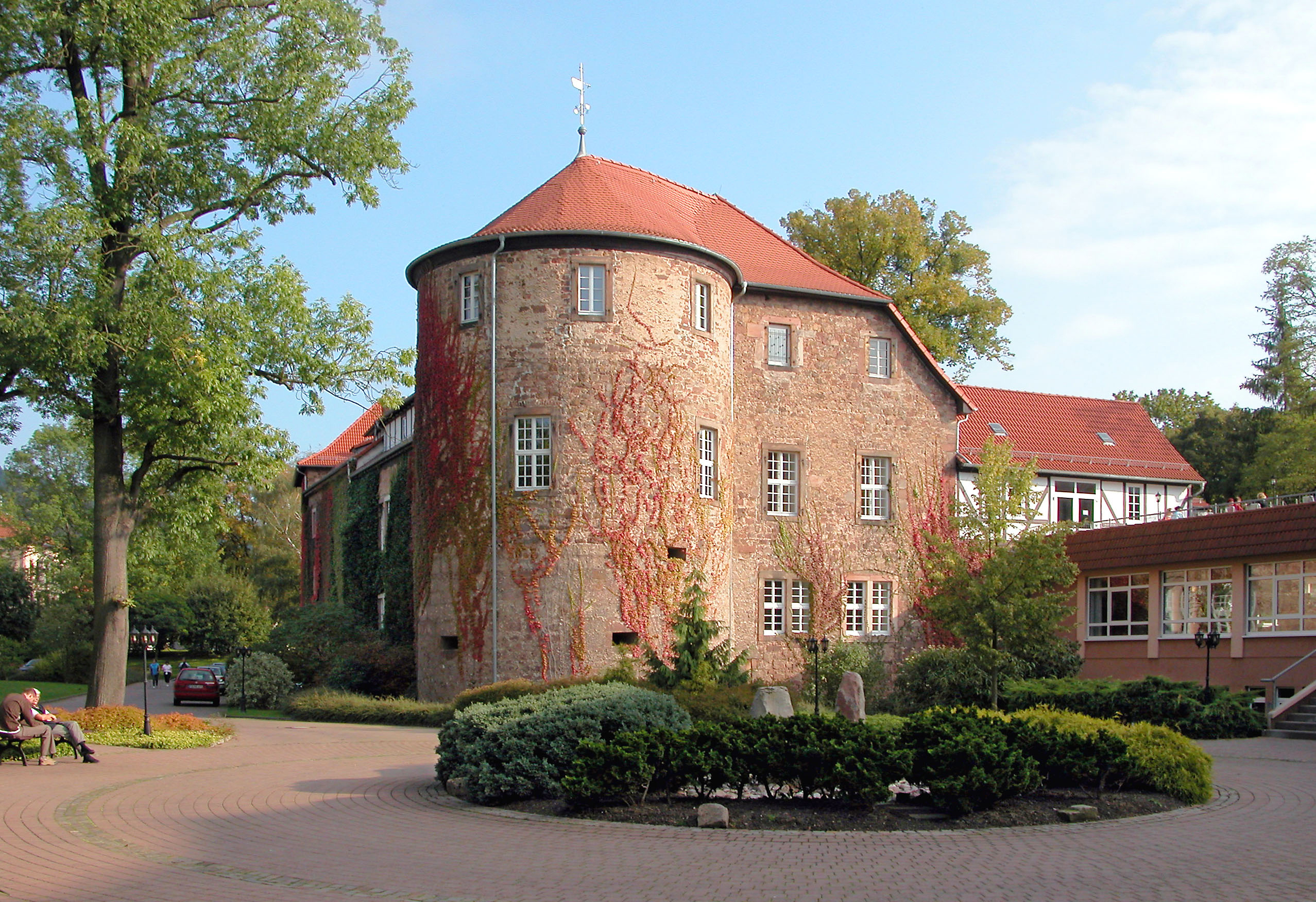 01.10.2004 36457 Stadtlengsfeld: Burgstraße 19 (GMP: 50.782161,10.128173): Um 1125 durch das Kloster Hersfeld veranlaßte Gründung der Burg Lengsfeld. Späterer Umbau zum Schloß. In der DDR Sanatorium. Heute private Burg-Klinik. Sicht von Nordwesten. [DSCN5505.JPG]20041001600DR.JPG(c)Blobelt